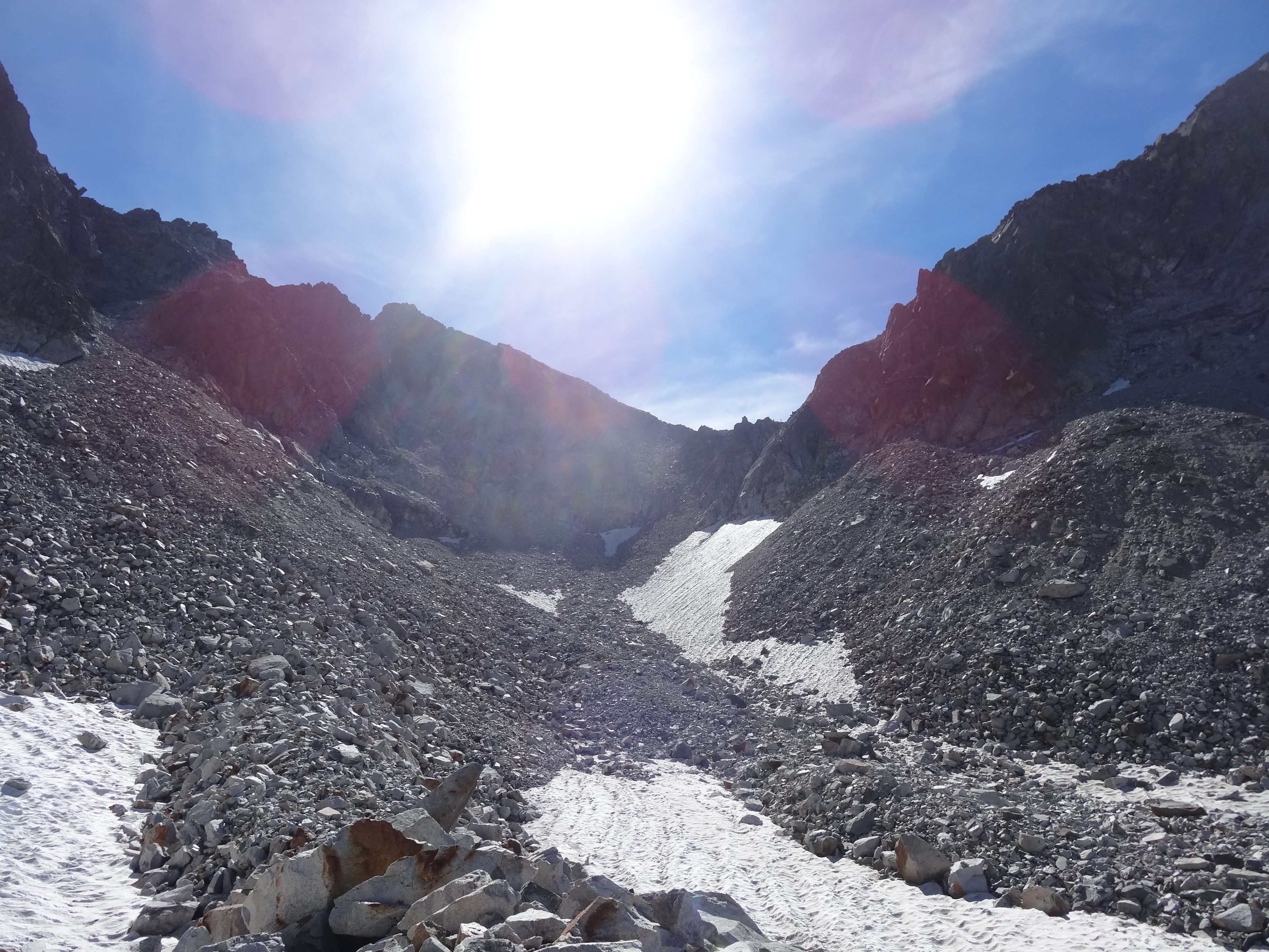 Coll d'Abellers (Vall de Besiberri), Vilaller, Lleida, Spain